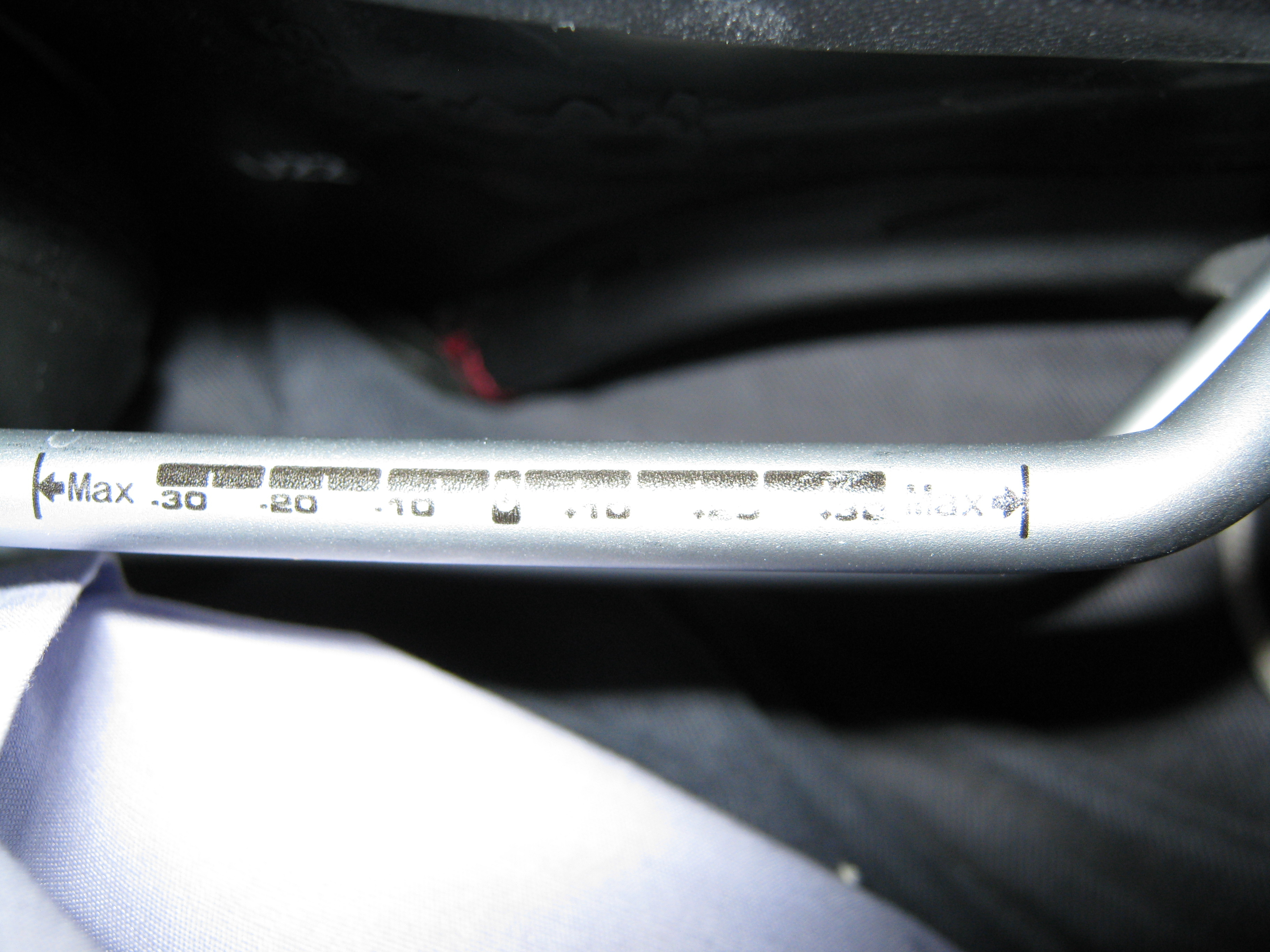 Sattelstrebe mit Markierung1